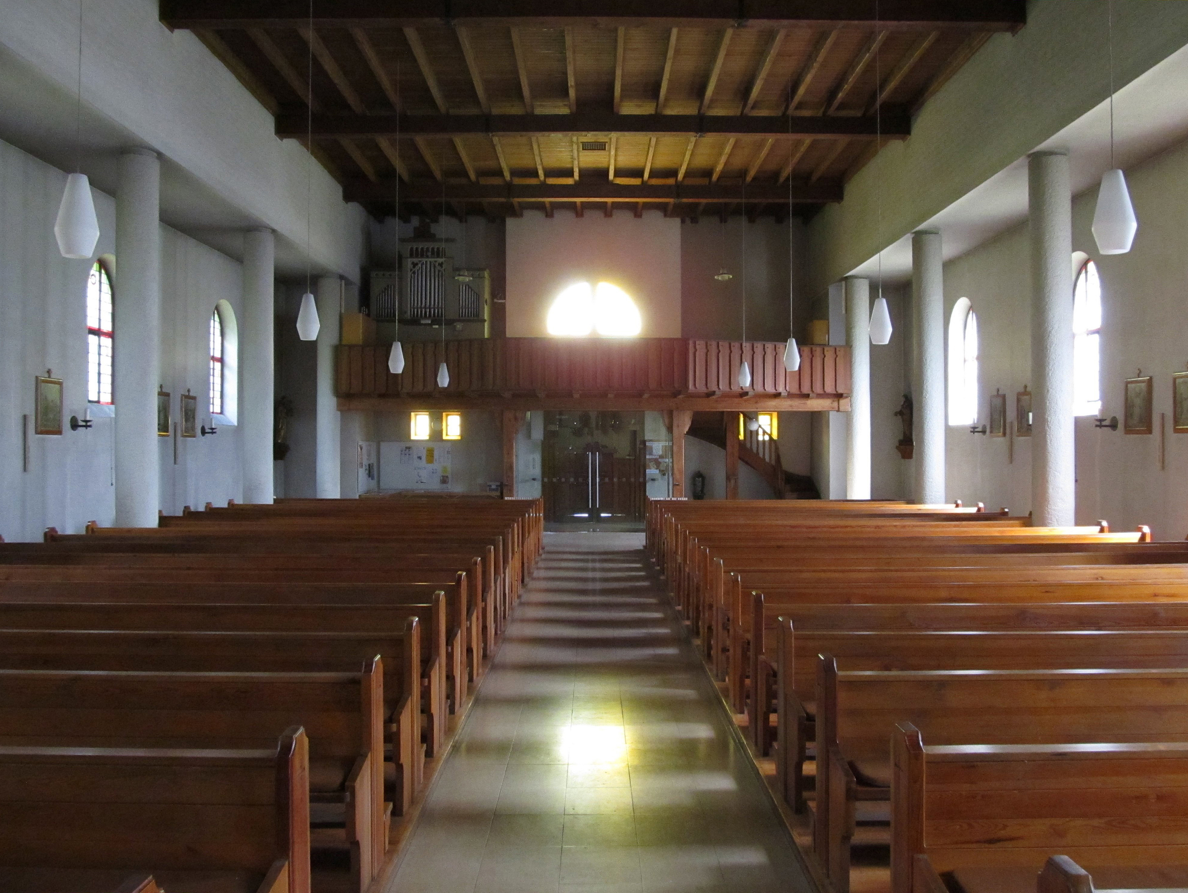 Blick ins Innere der katholischen Kirche St. Josef in Heckendalheim, Gemeinde Mandelbachtal, Saarland